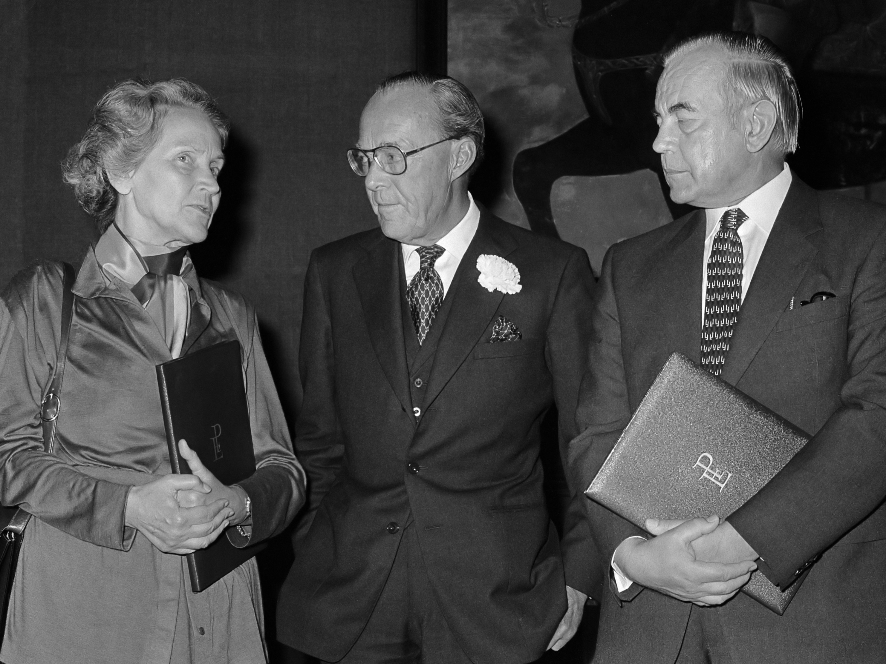 De Erasmusprijs 1979 door Prins Bernhard, in tegenwoordigheid van koningin Juliana, uitgereikt aan het dagblad Neue Zürcher Zeitung en het weekblad Die Zeit. Prins Bernhard met dr. Marion Gravin Dönhoff (l) en dr. Fred Luchsinger (r) 19 september 1979